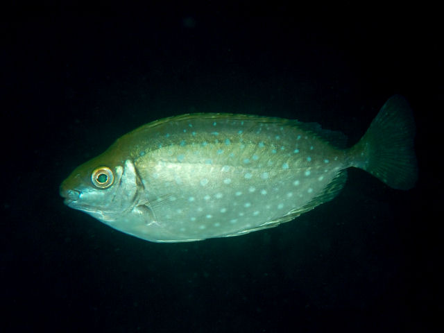 アイゴ Siganus fuscescens